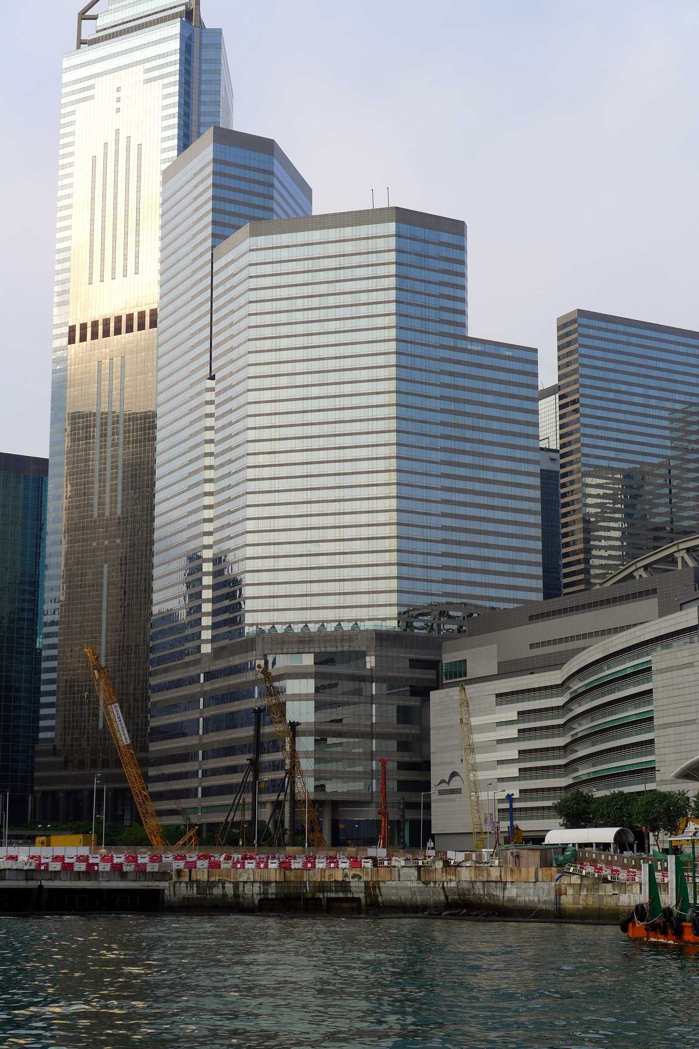 Renaissance Harbour View Hotel